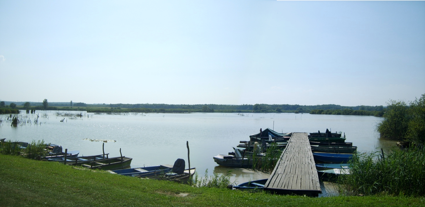 Zalaszentmihály csónakázótó